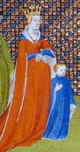 Edwiga z Wessexu a Ludvík IV.